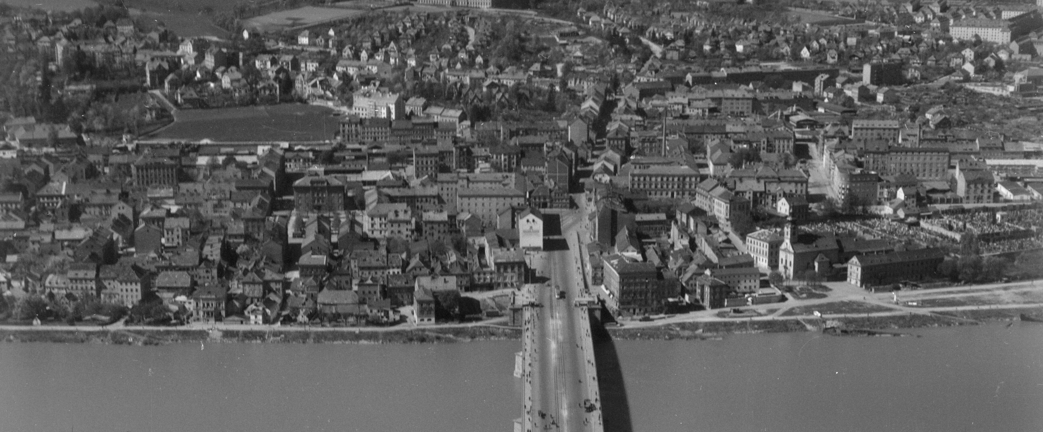 Luftbild Urfahrs von Süden.